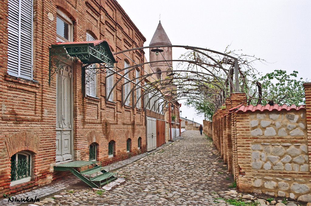 სიღნაღი